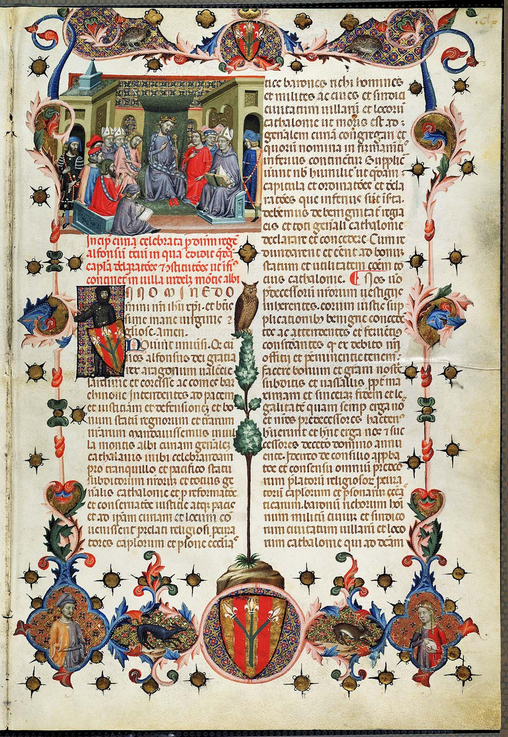 Usaticis Barchinonensis Usatges de Barcelona